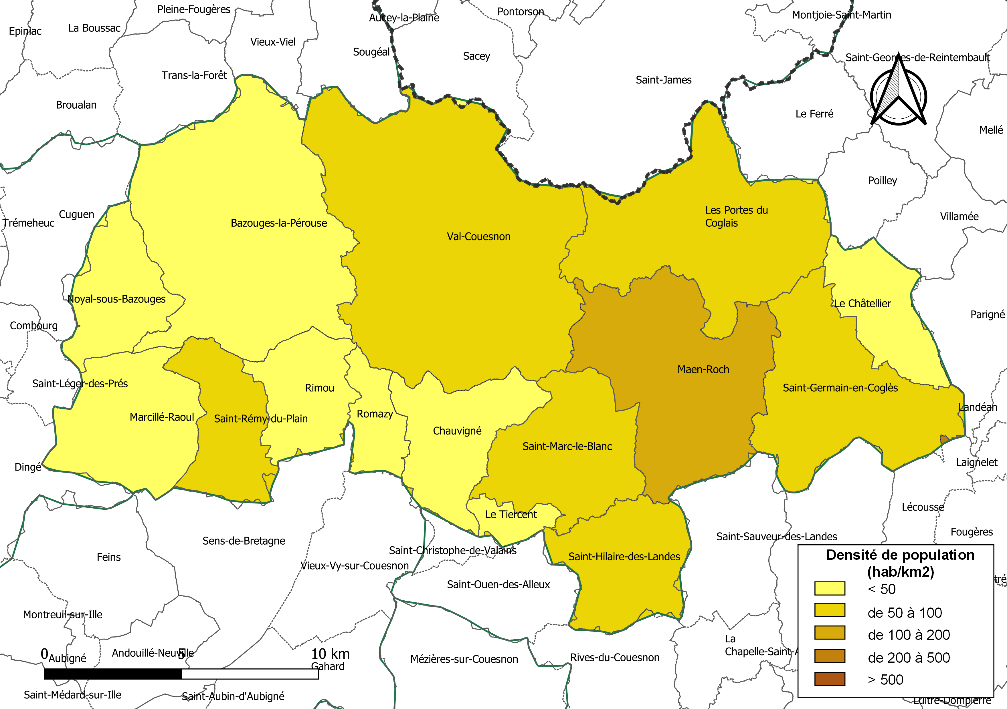 Carte des densités de population (millésimée 2016) des communes de l'intercommunalité Couesnon Marches de Bretagne, département d'Ille-et-Vilaine, France. Composition au 1er janvier 2019.